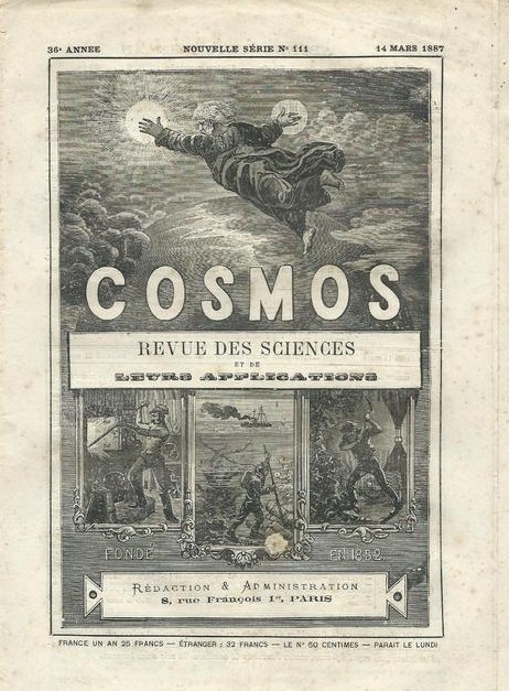 Cosmos, revue des sciences et de leurs applications du 14 mars 1887.